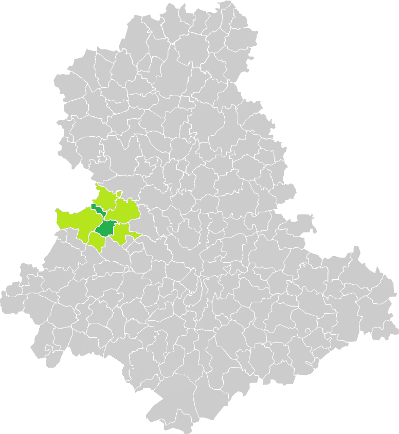 Carte de situation de la commune de Saint-Brice-sur-Vienne (en vert foncé) dans le votre Canton (en vert clair) sur une carte des communes de la Haute-Vienne